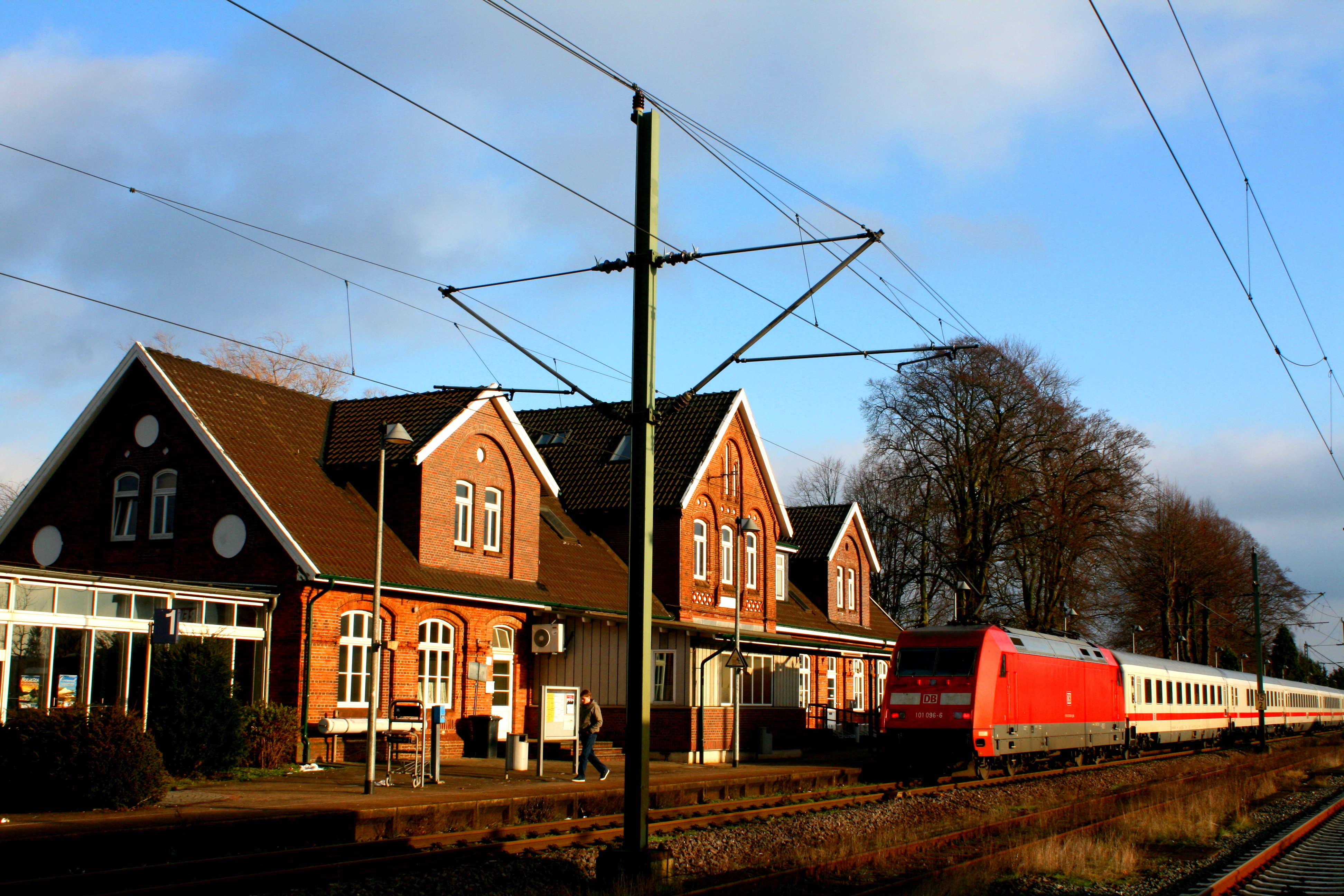 Bahnhof Bad Zwischenahn